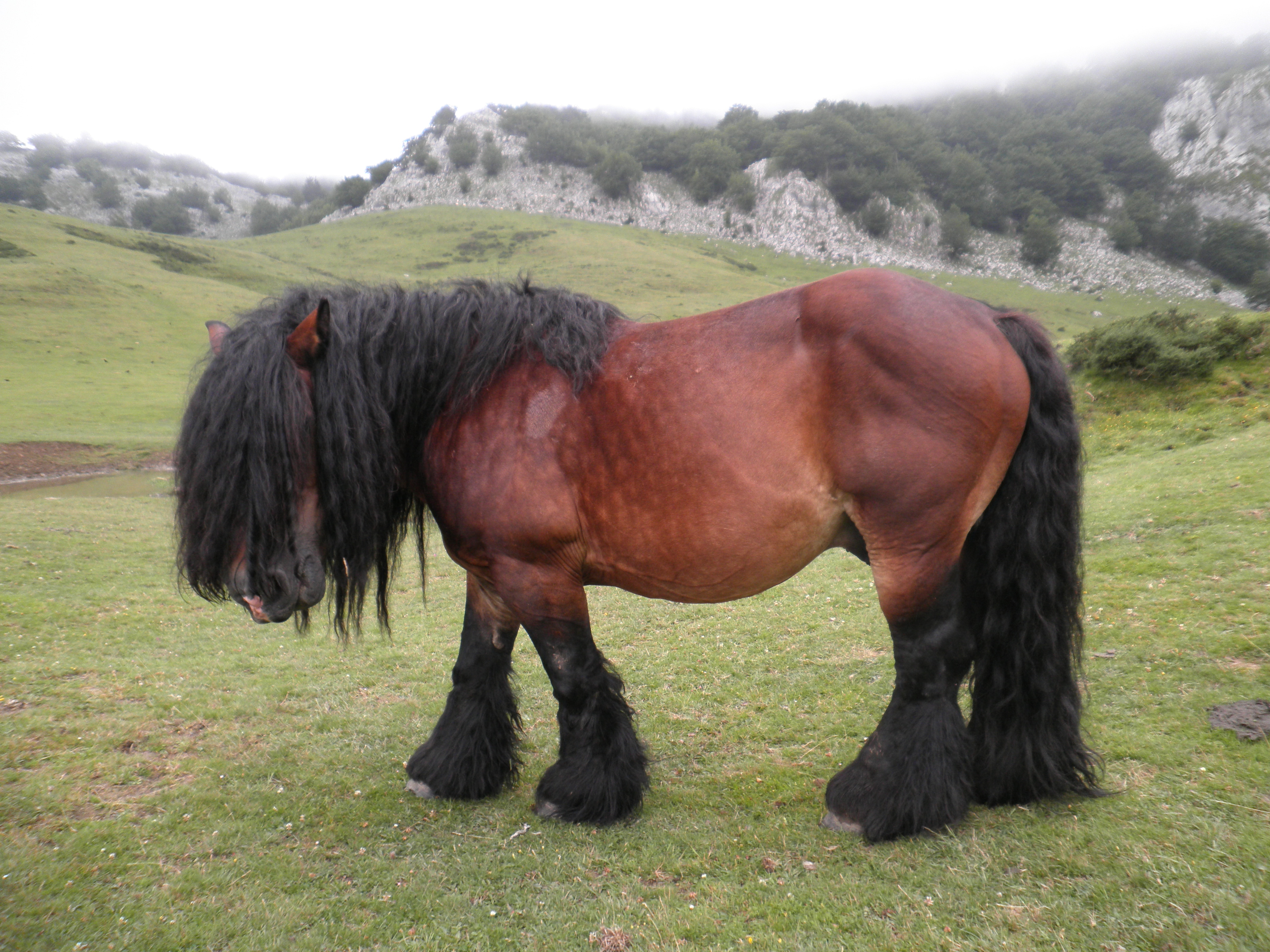 Zaldia Arrabako zelaietan. Gorbeia.